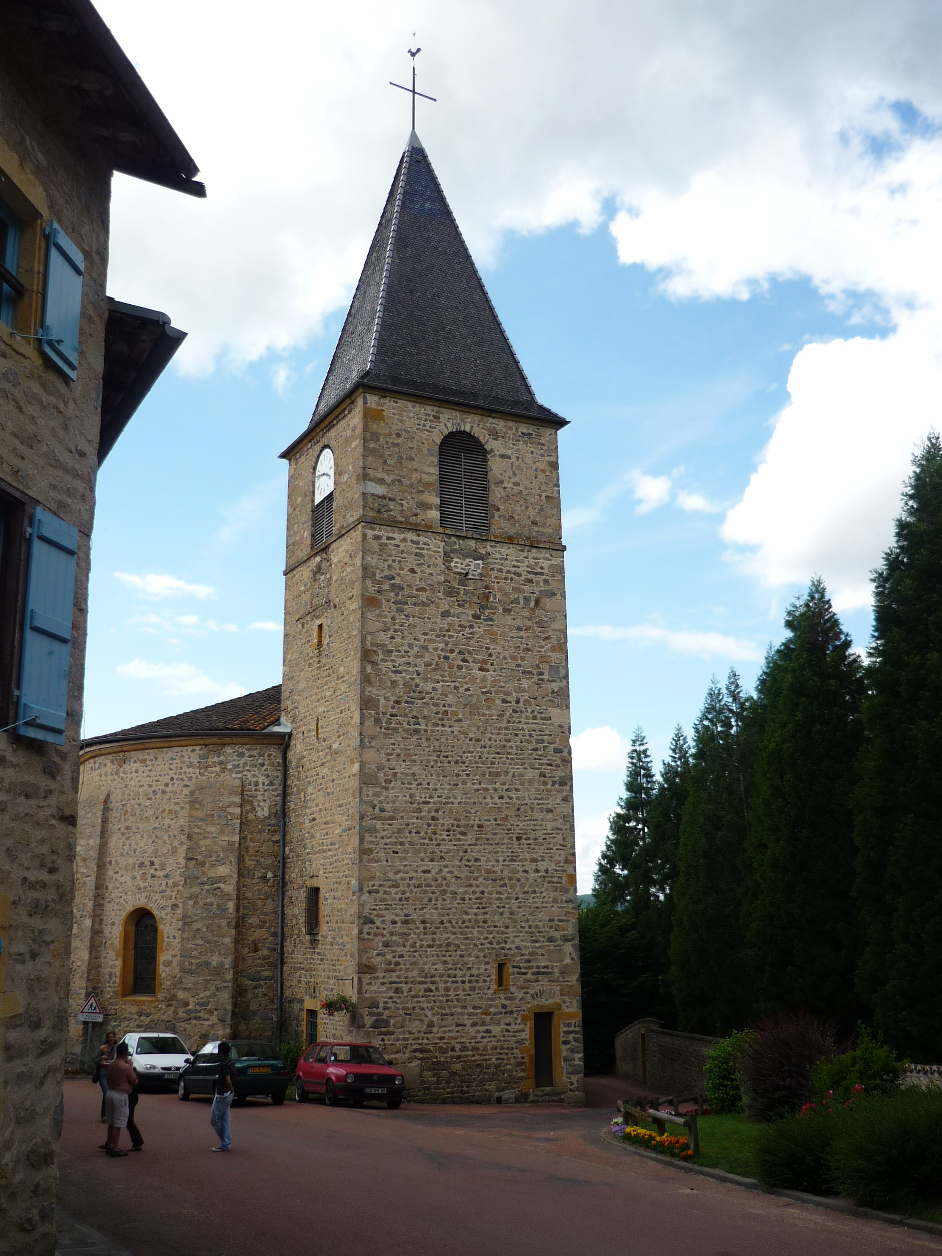 Église de Ronno, dans le département du Rhône en France